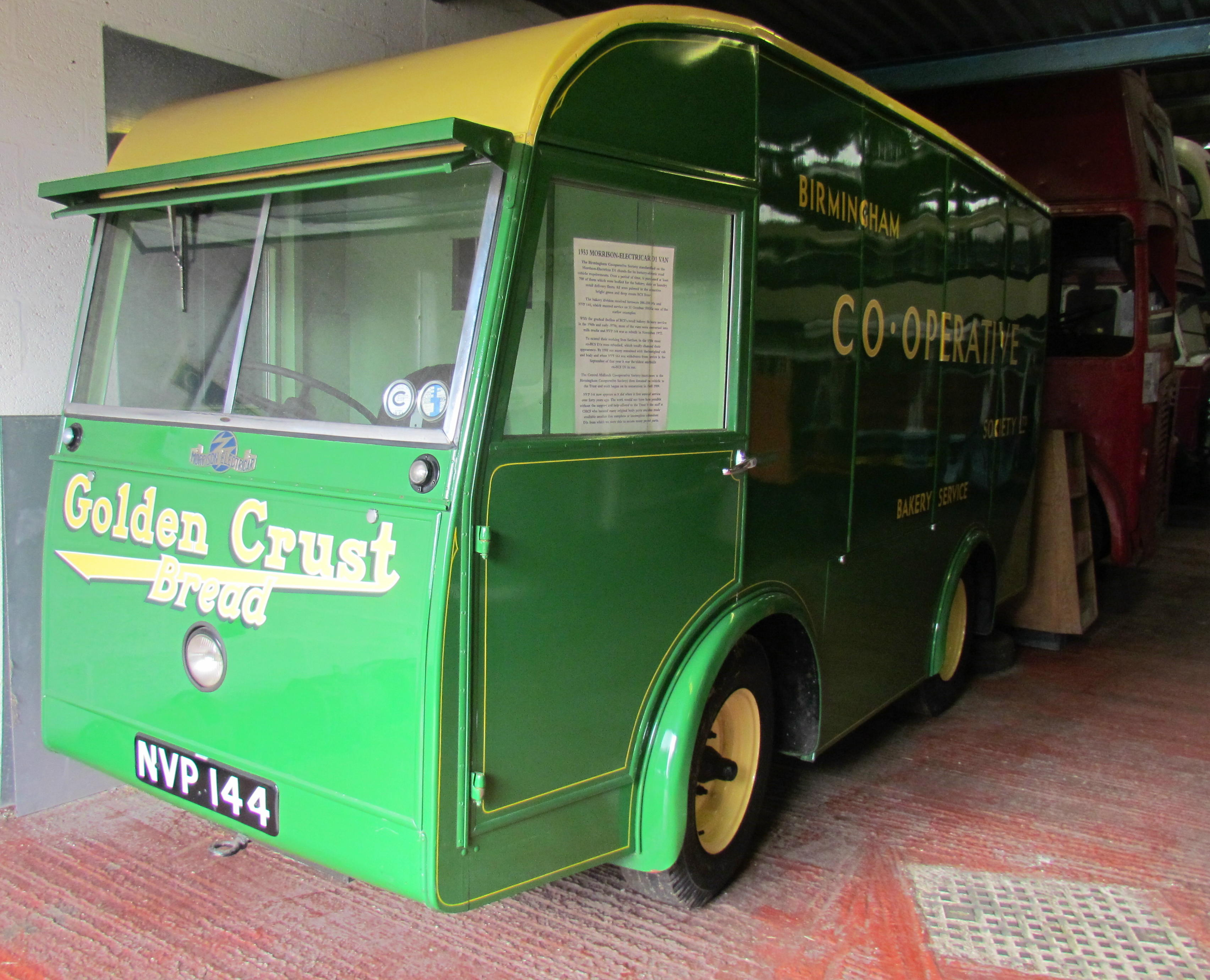 1953 - Morrison Electricar - MVP 144